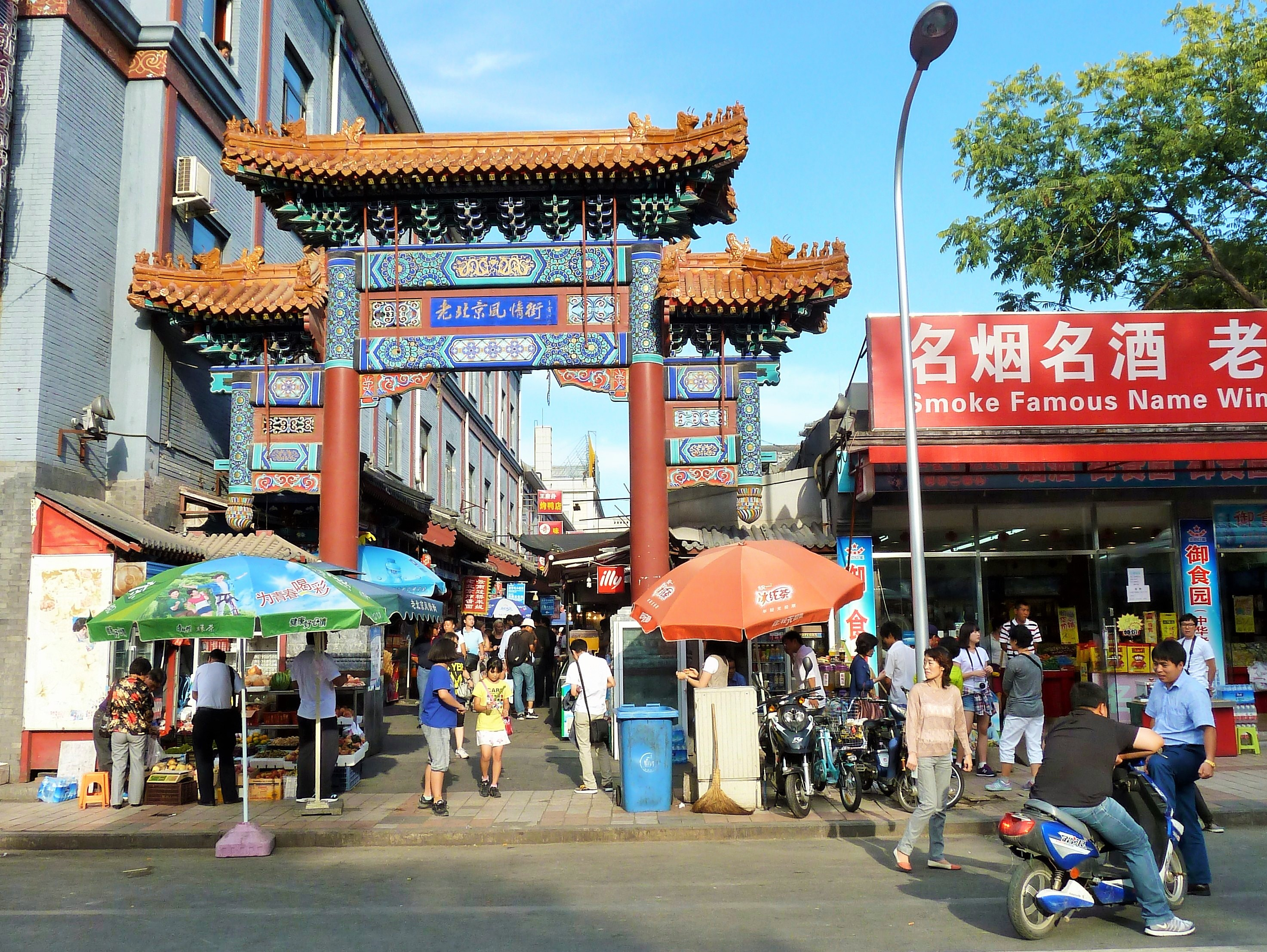 Dans Pedestrian zones in Wangfujing l, à Pékin .- ,Chine